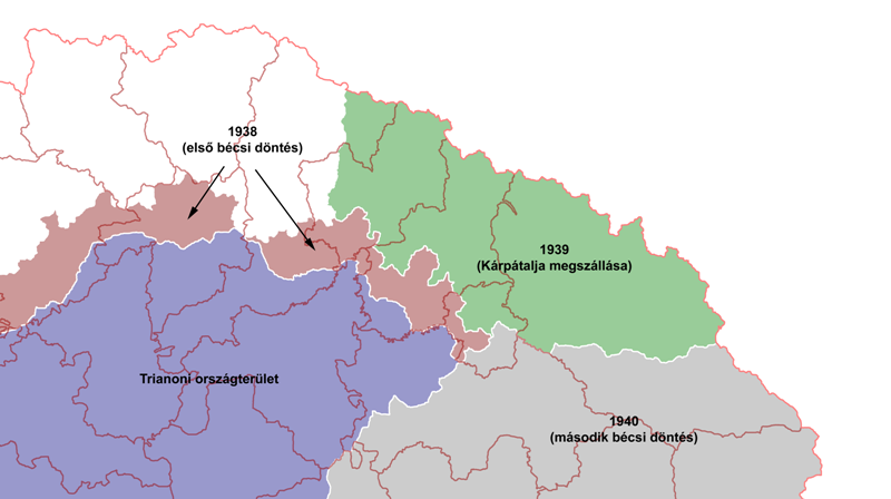 Magyarország északkeleti határának változásai, 1937-1940, az 1918-ban érvényes megyehatárok feltüntetésével